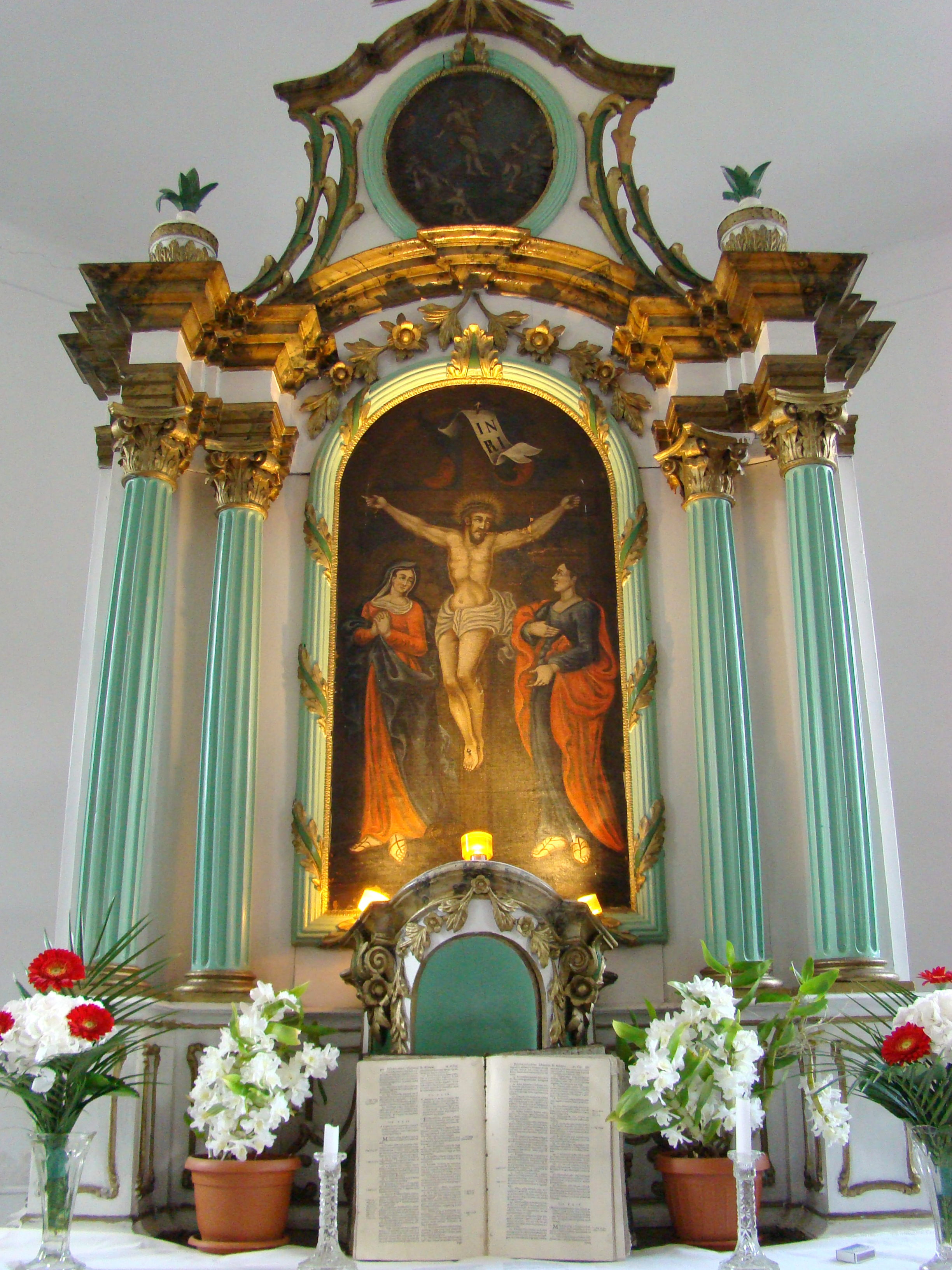 Biserica evanghelică, oraș Copșa Mică, str. Mediașului 100 01